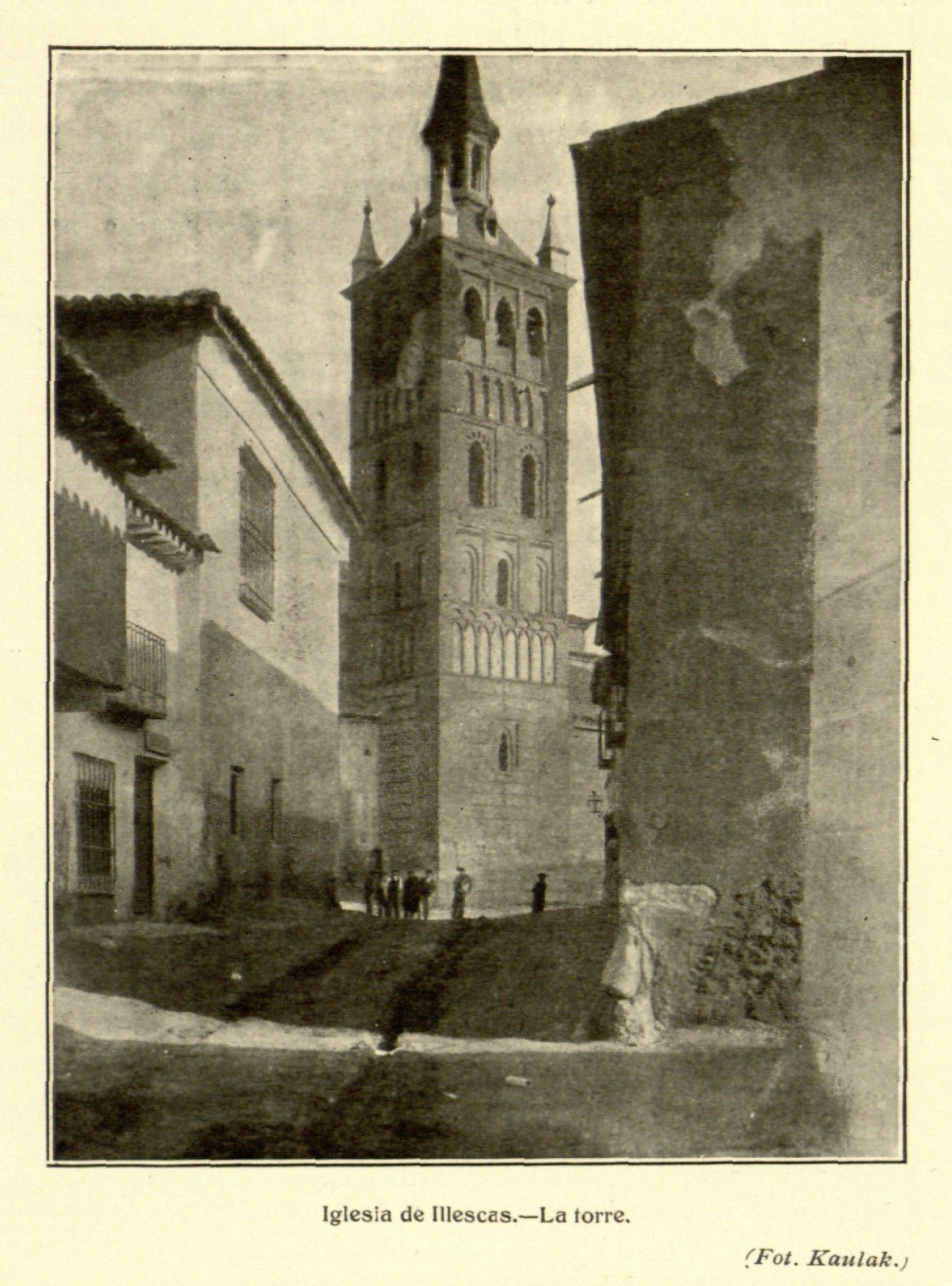 Iglesia de Illescas. La torre.